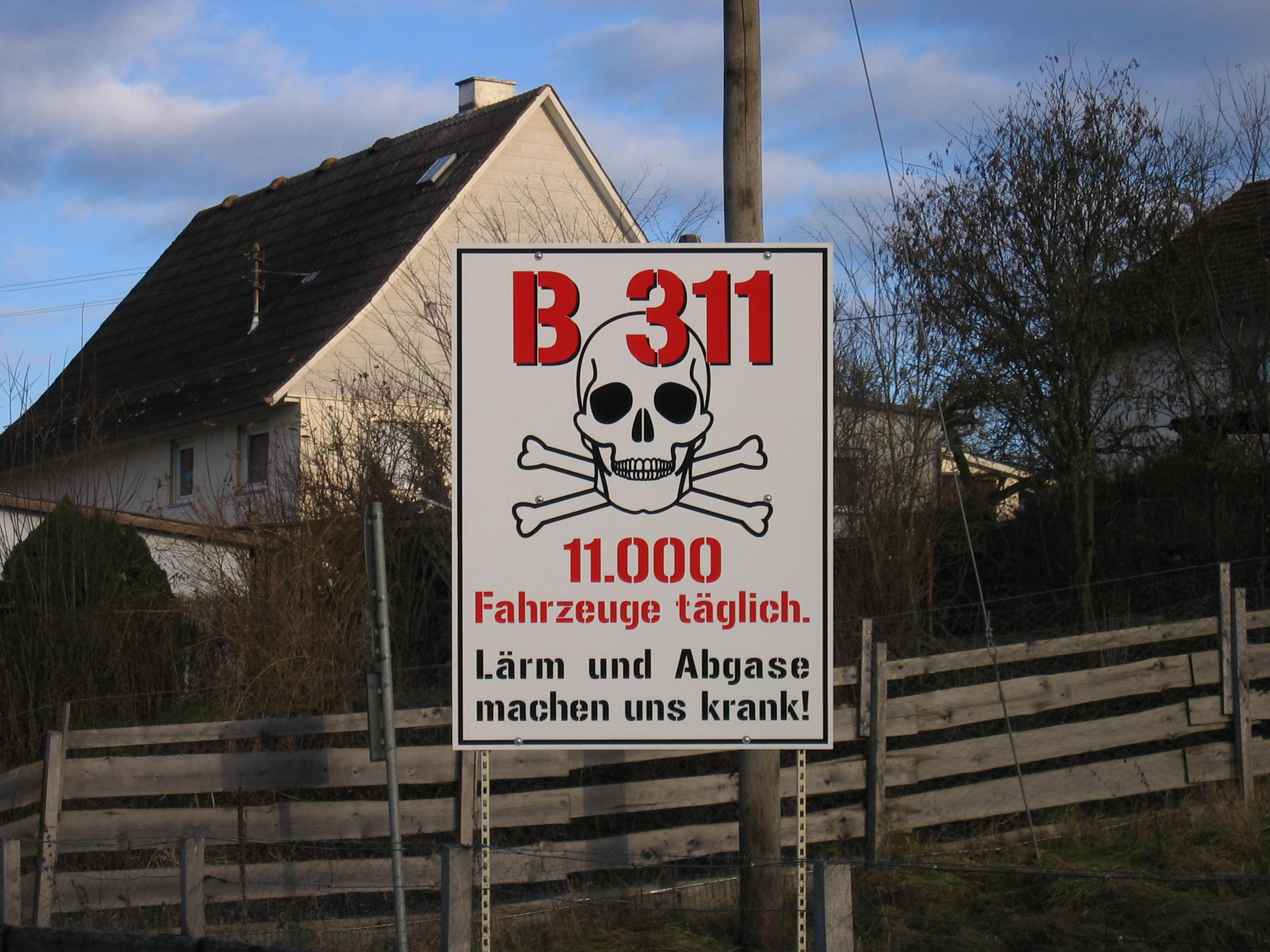 Protesttafel der Bügerinitiative Göggingen an der Bundesstraße 311 (Ortseinfahrt aus Richtung Meßkirch)